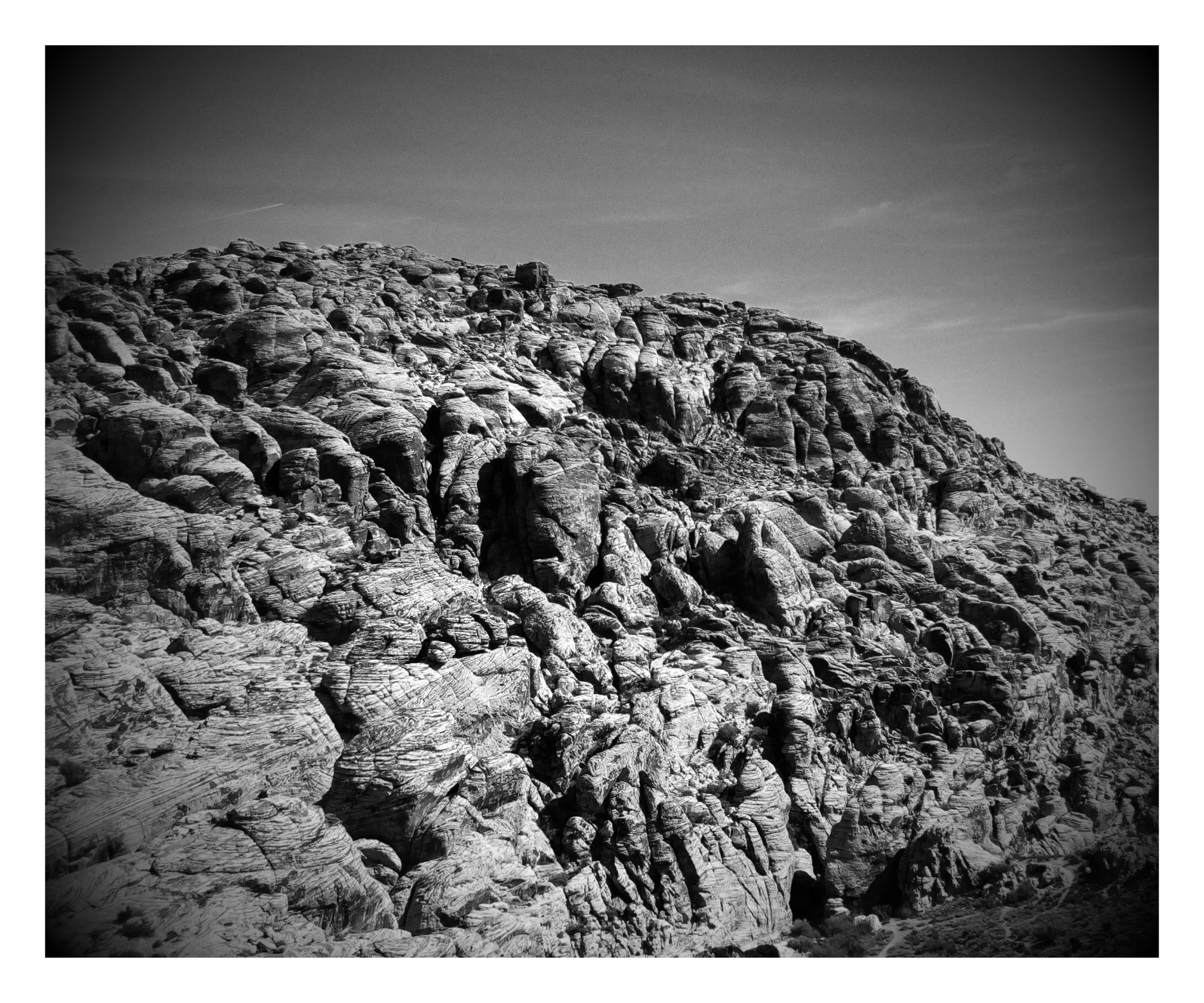 התפוררות אבן חול בקנון רד רוק, מדבר מוהאבי, נבאדה.